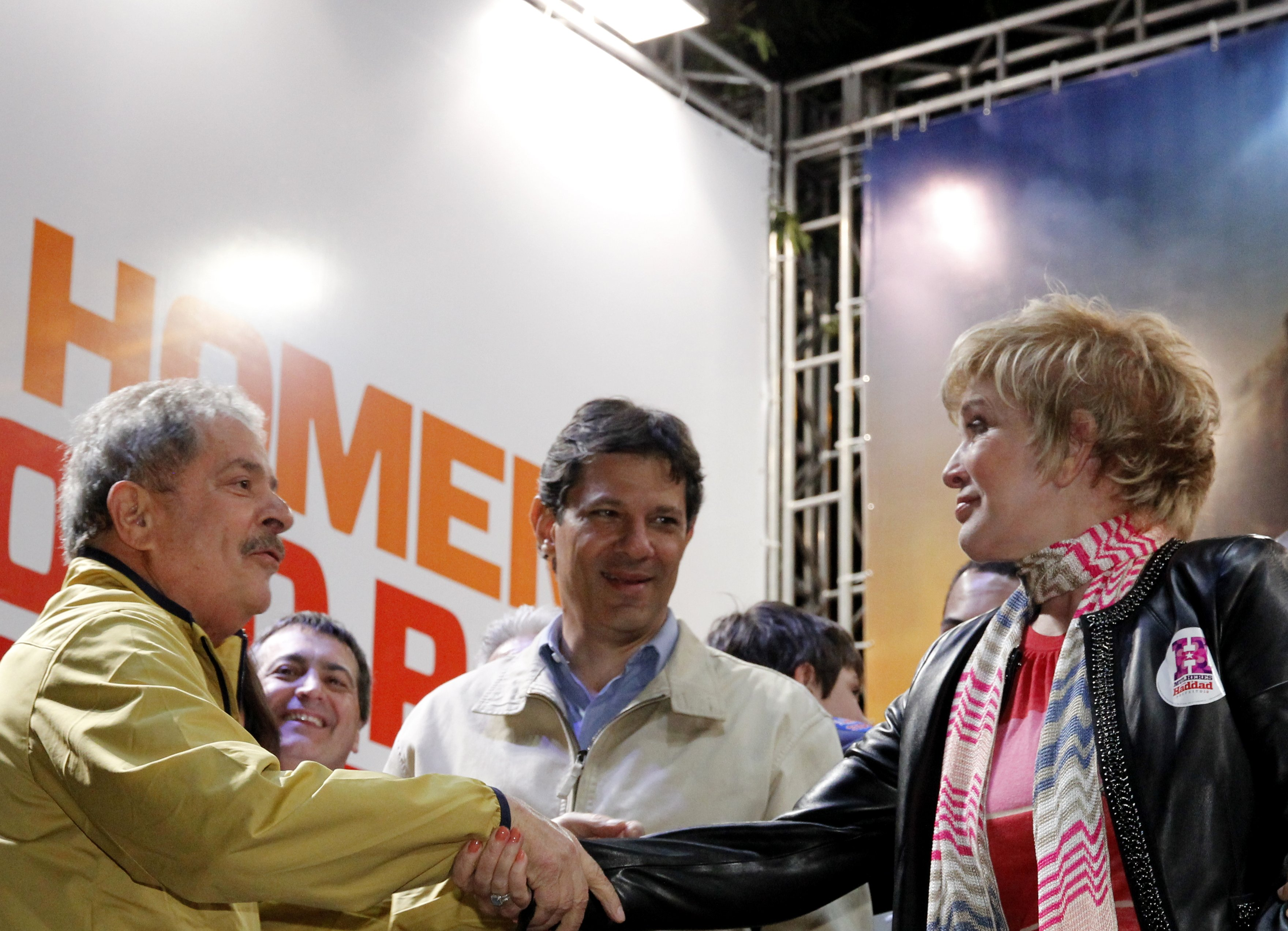 Fernando Haddad com ex presidente Lula e Marta Suplicy